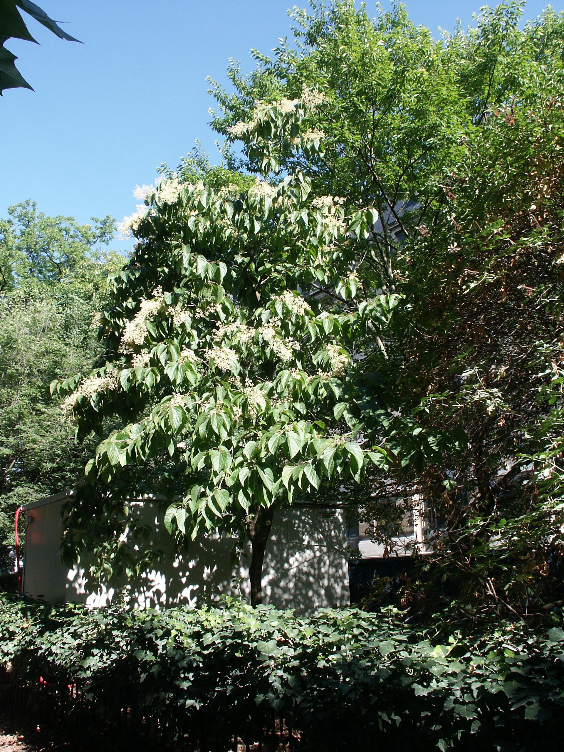 Poliothyrsis sinensis en fleur. Jardin des Plantes, Paris - France